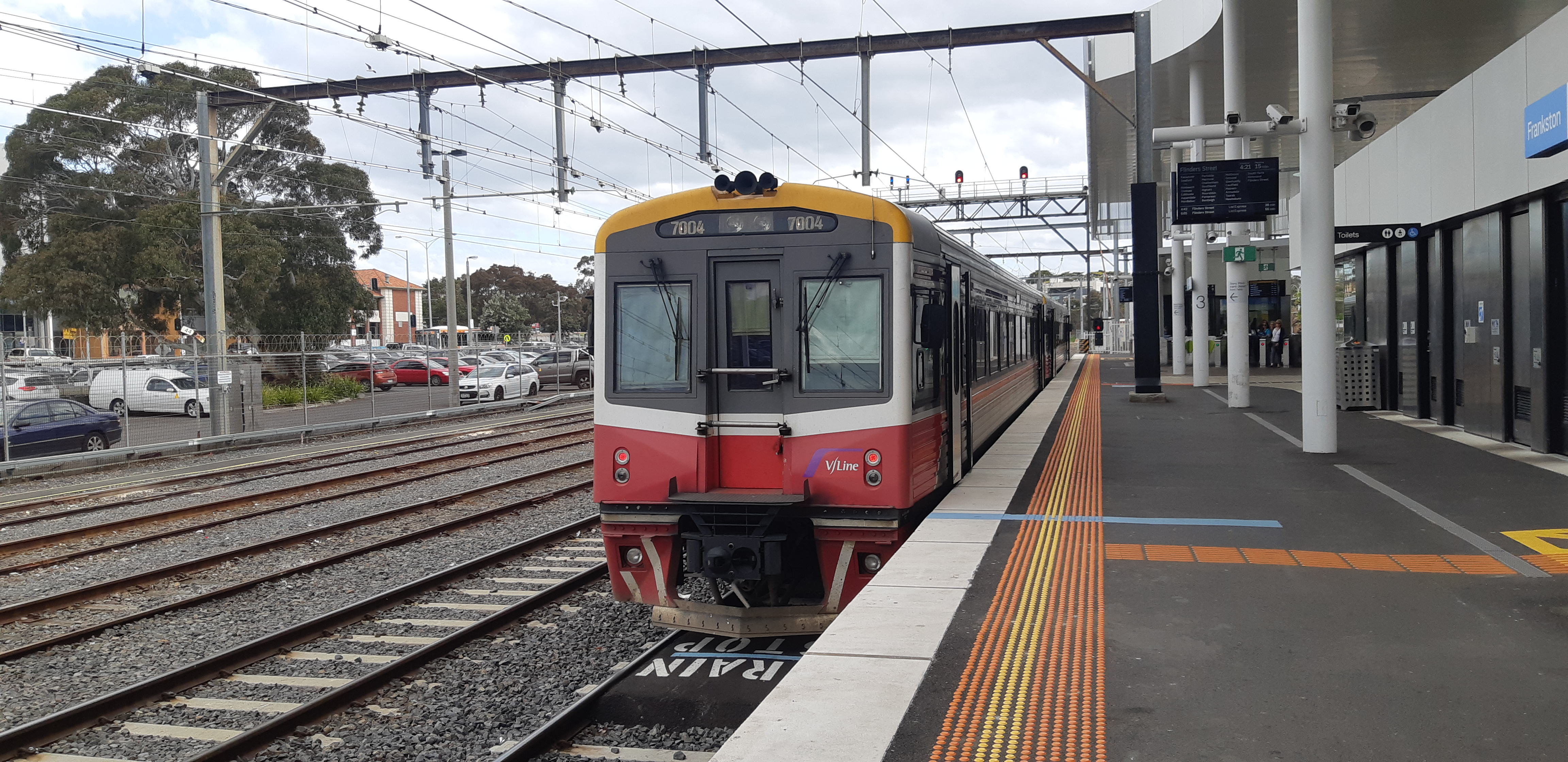 Stasiun kereta api Frankston